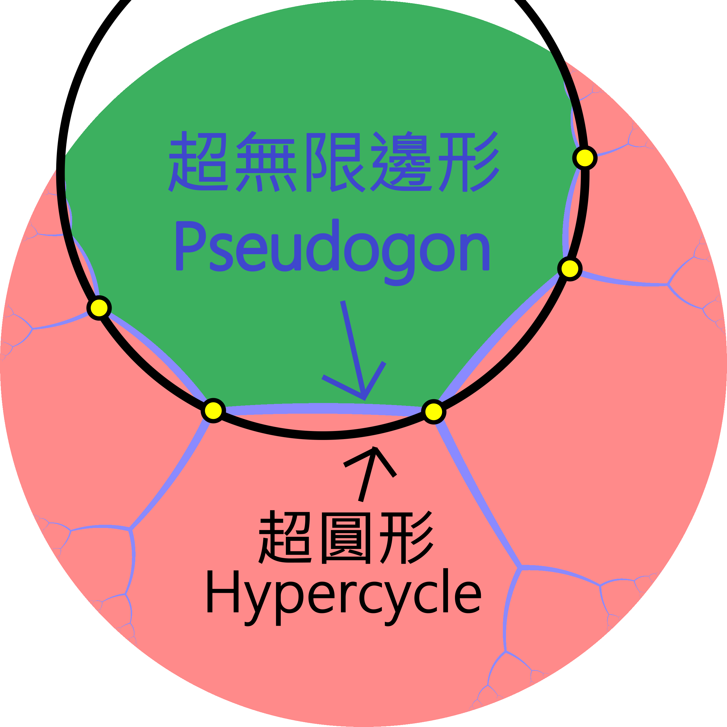 三階超無限(9i)邊形上的超無限(9i)邊形(pseudogon (iπ/λ)，λ=π/9)